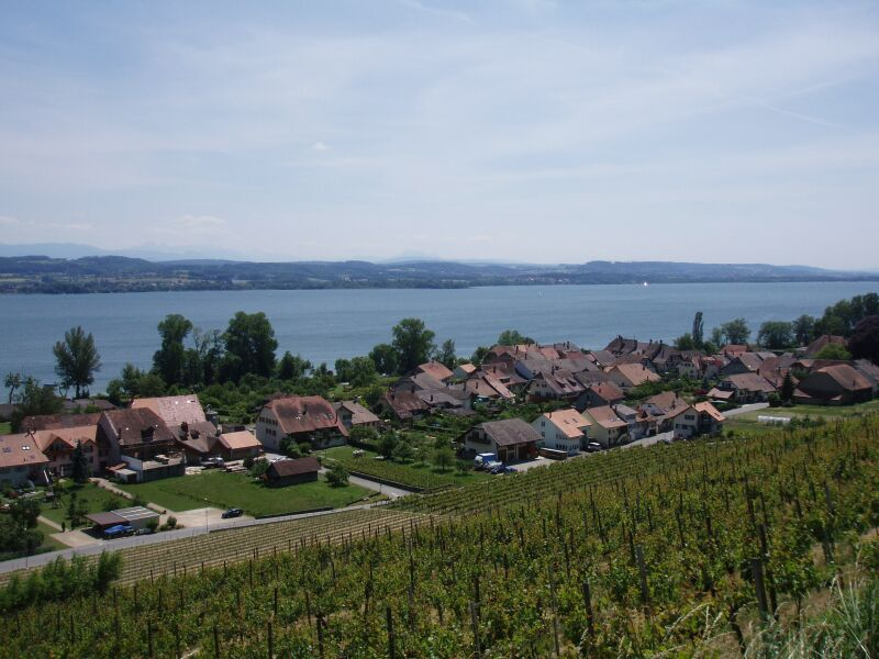 Praz (Vully), fotografiert vom Südhang des Mont Vully, mit dem Murtensee